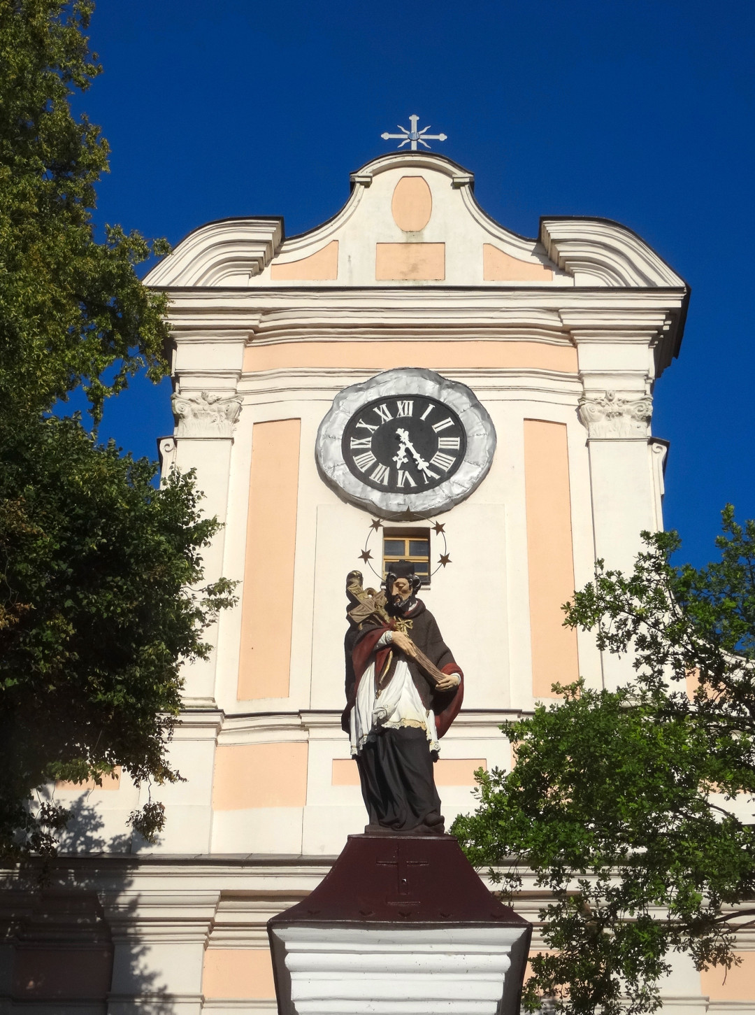 Łabiszyn - dawny kościół klasztorny reformatów, ob. parafialny pw. św. Mikołaja, 2 poł. XVIII w.